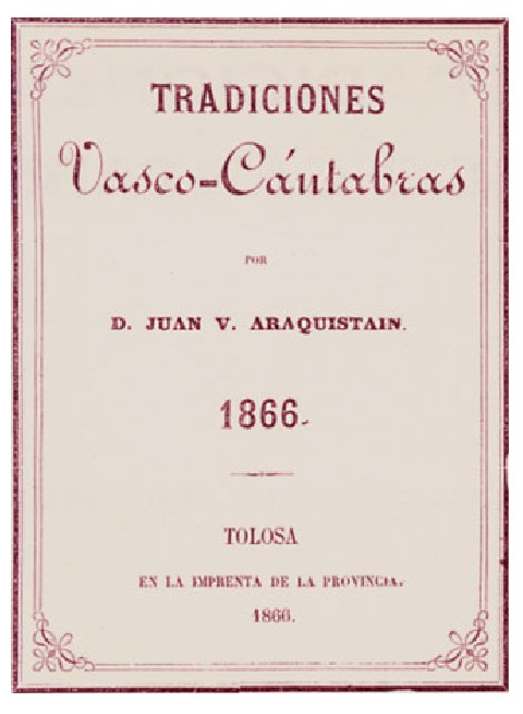 Tolosan 1866an argitara eman zen Juan Venancio Arakistainen Tradiciones Vasco-Cántabras lanaren lehen argitalpenaren azala.